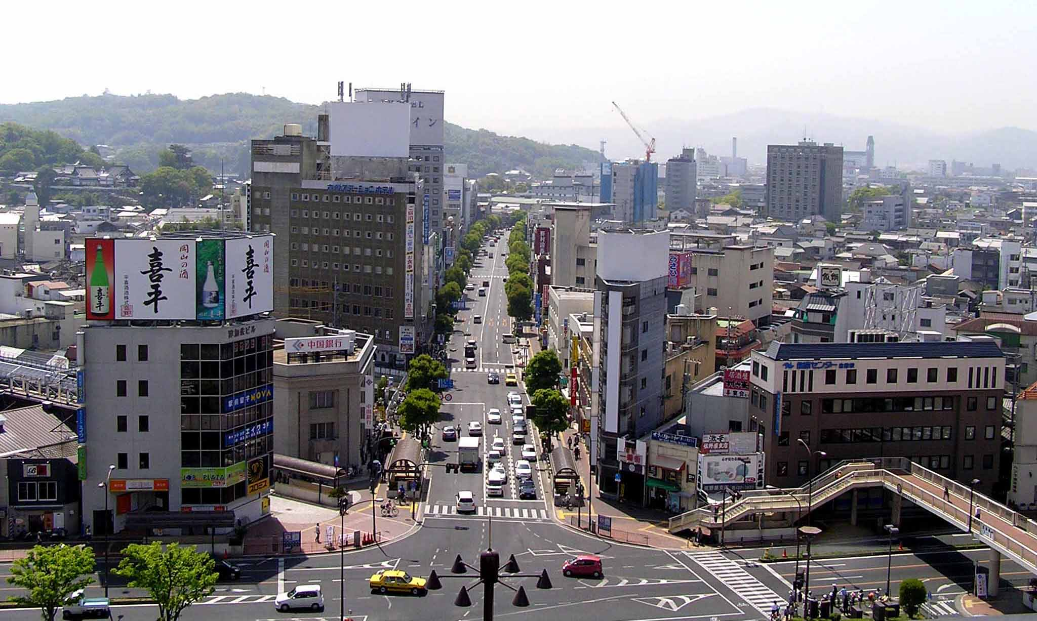 nakasho town/kurashiki city